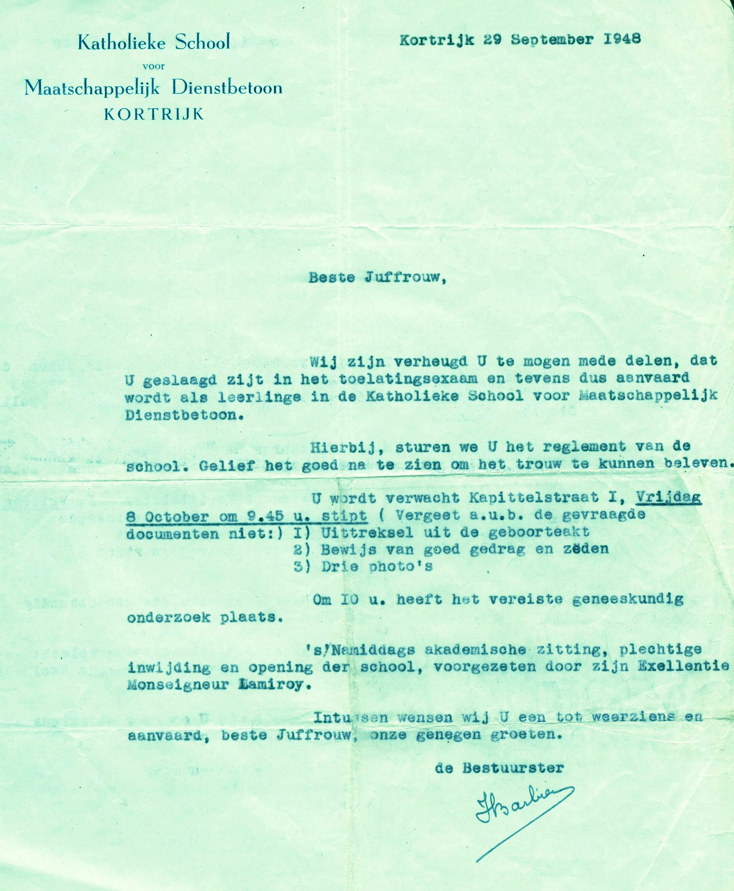 In 1948 verwelkomt de Katholieke School voor Maatschappelijk Dienstbetoon (KSMD) haar eerste studentes.